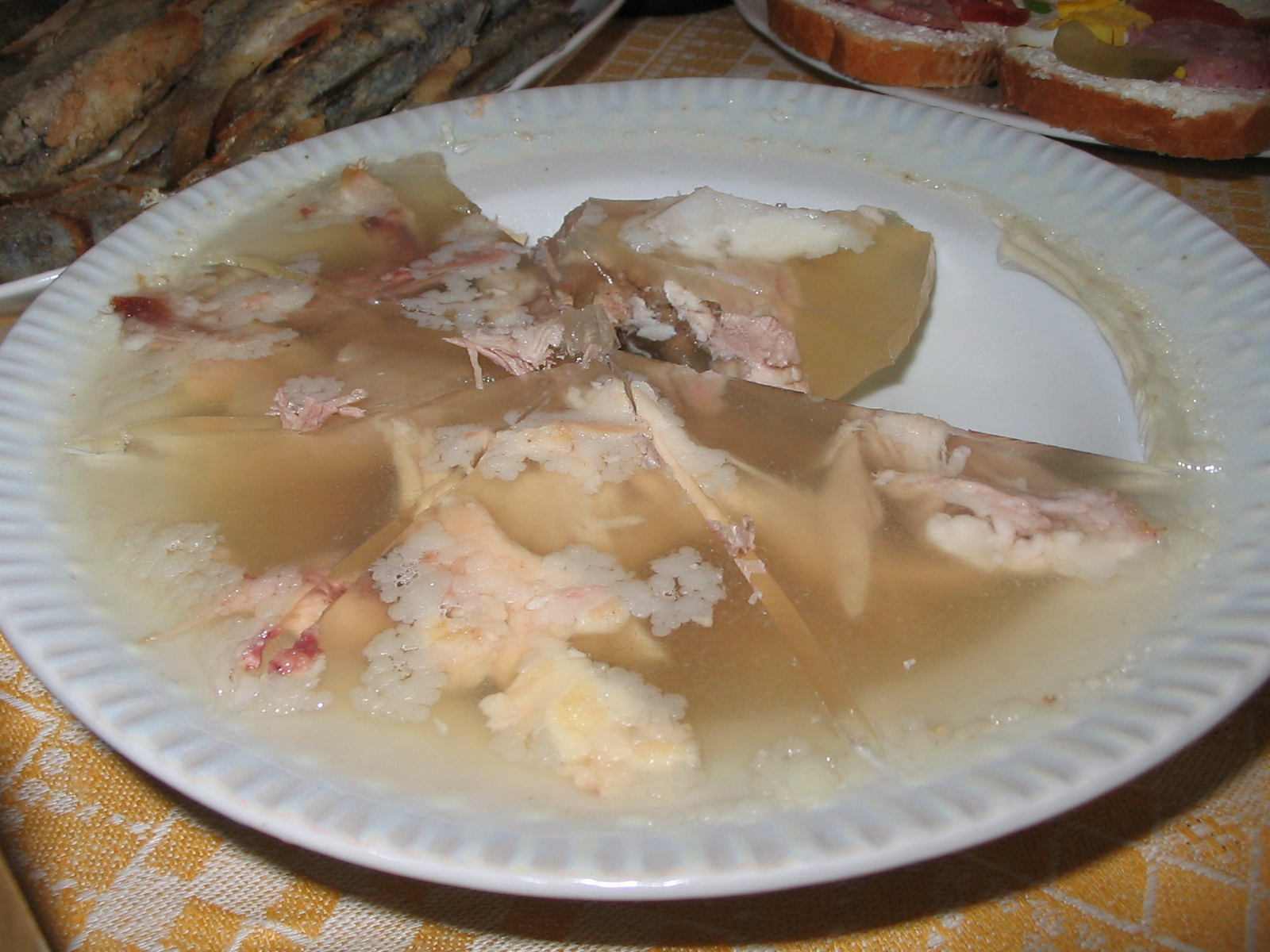 холодець - заливне з відвареного м'яса зі спеціями